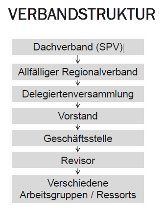 Verbandsstruktur im Detail